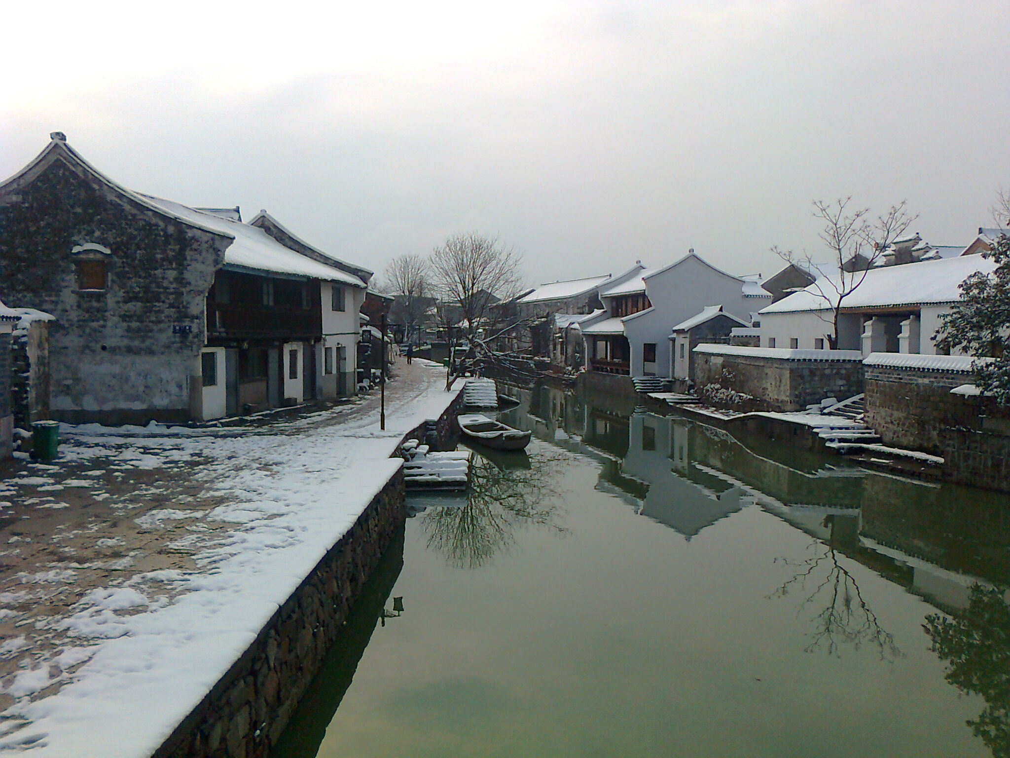 中文（中国大陆）: 在白雪映衬下，鸣鹤古镇显得格外宁静。